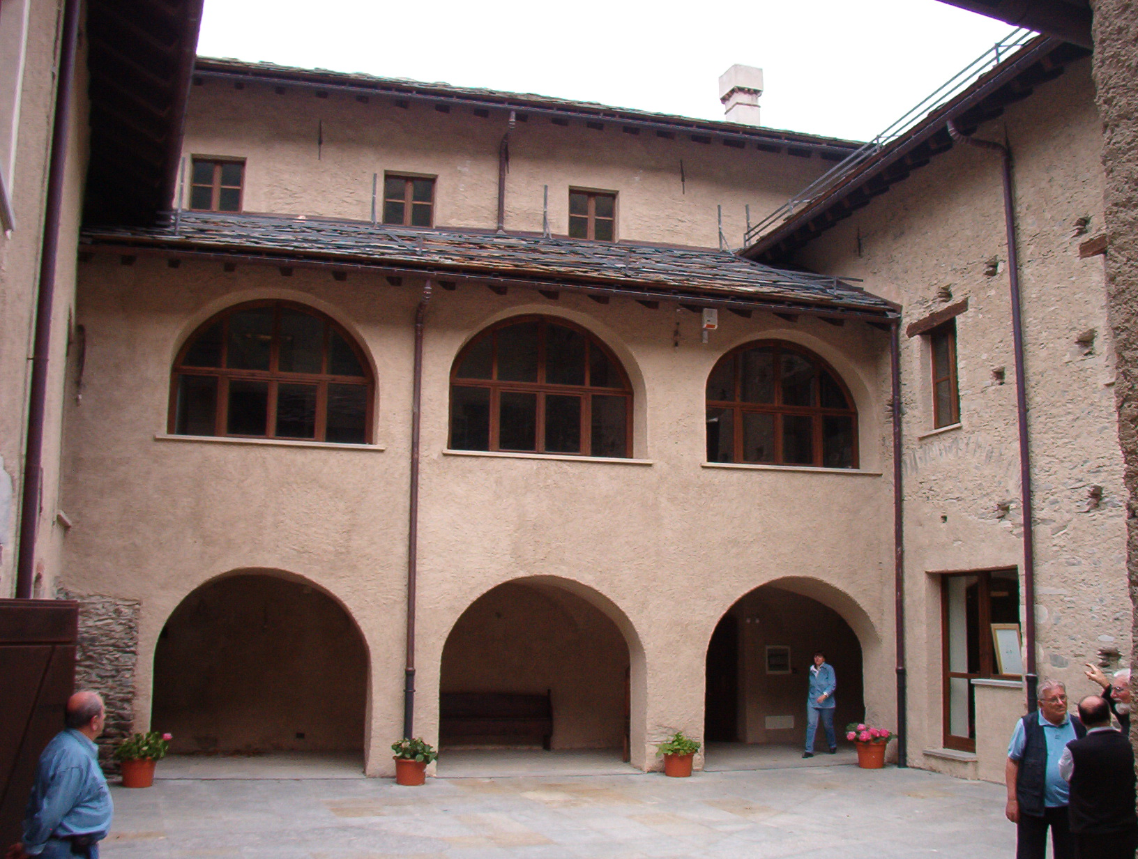 Abbazia di Novalesa - Provincia di Torino - Italy